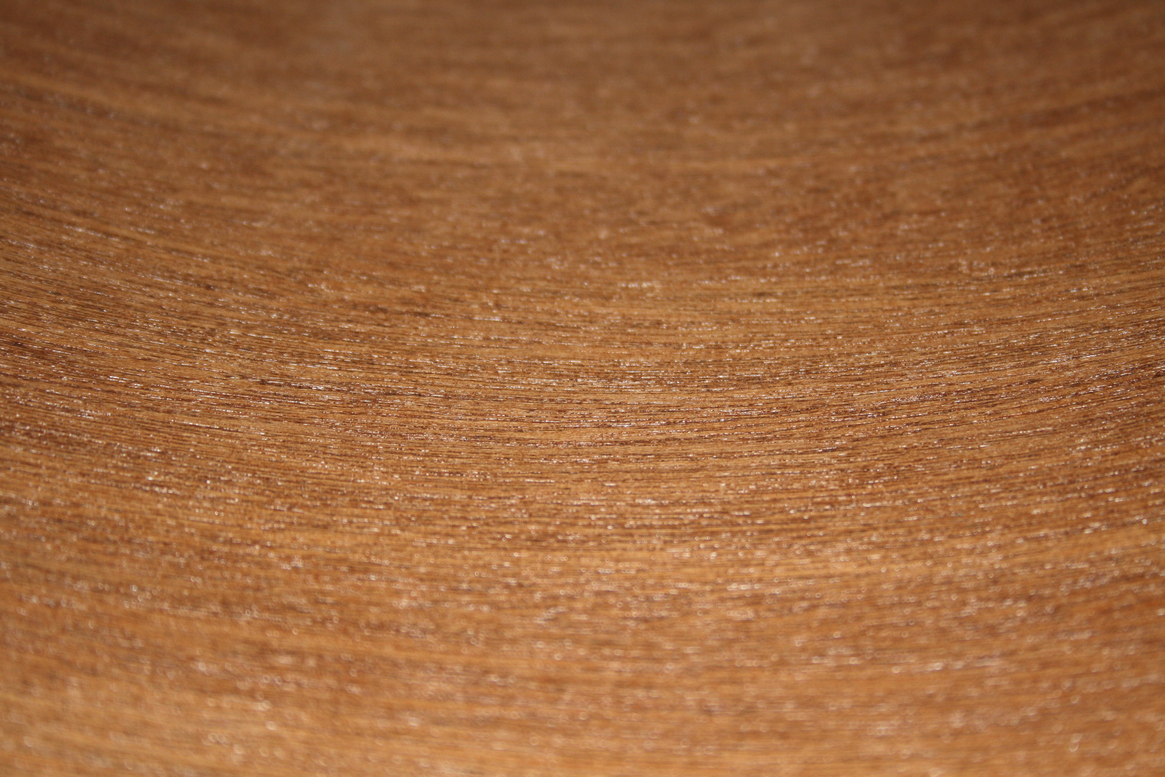 Basssdrum Kapur